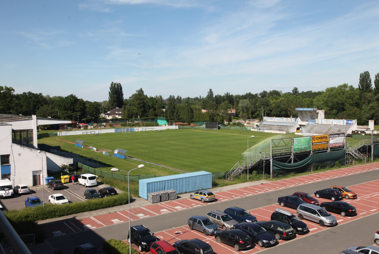 Letní stadion Pardubice